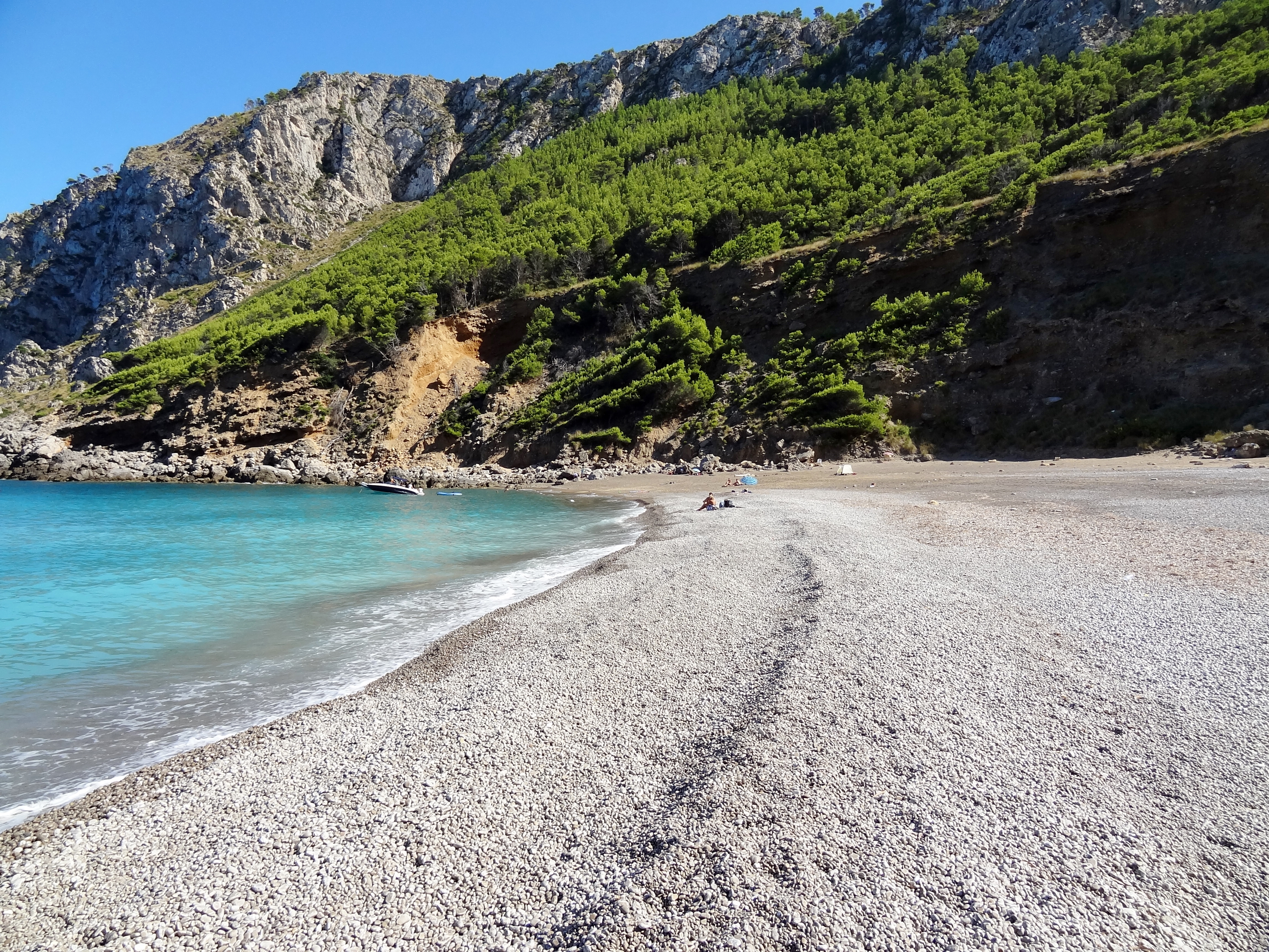 Platja des Coll Baix, Strand auf der Halbinsel Victòria in der Gemeinde Alcúdia, Mallorca, Spanien